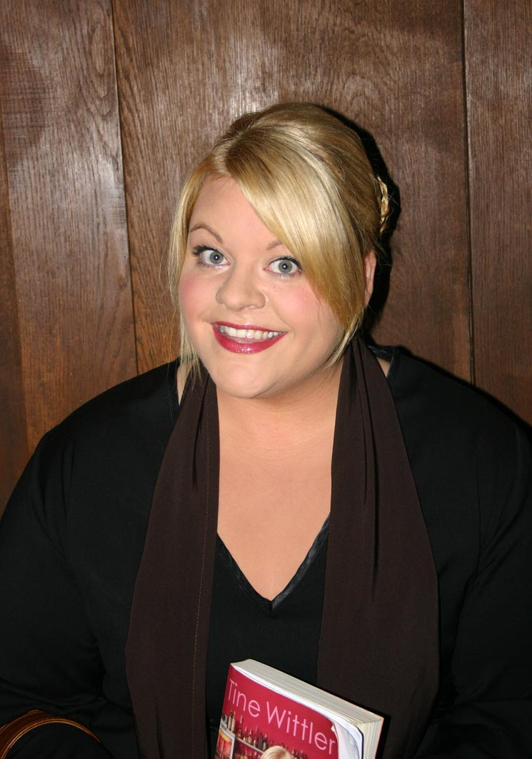 Tine Wittler (Christine - * 2. April 1973 in Rahden, Westfalen) ist eine deutsche Buchautorin und Fernsehmoderatorin. 2004 erhielt sie den Deutschen Fernsehpreis für die Docutainment-Reihe Einsatz in 4 Wänden (RTL)